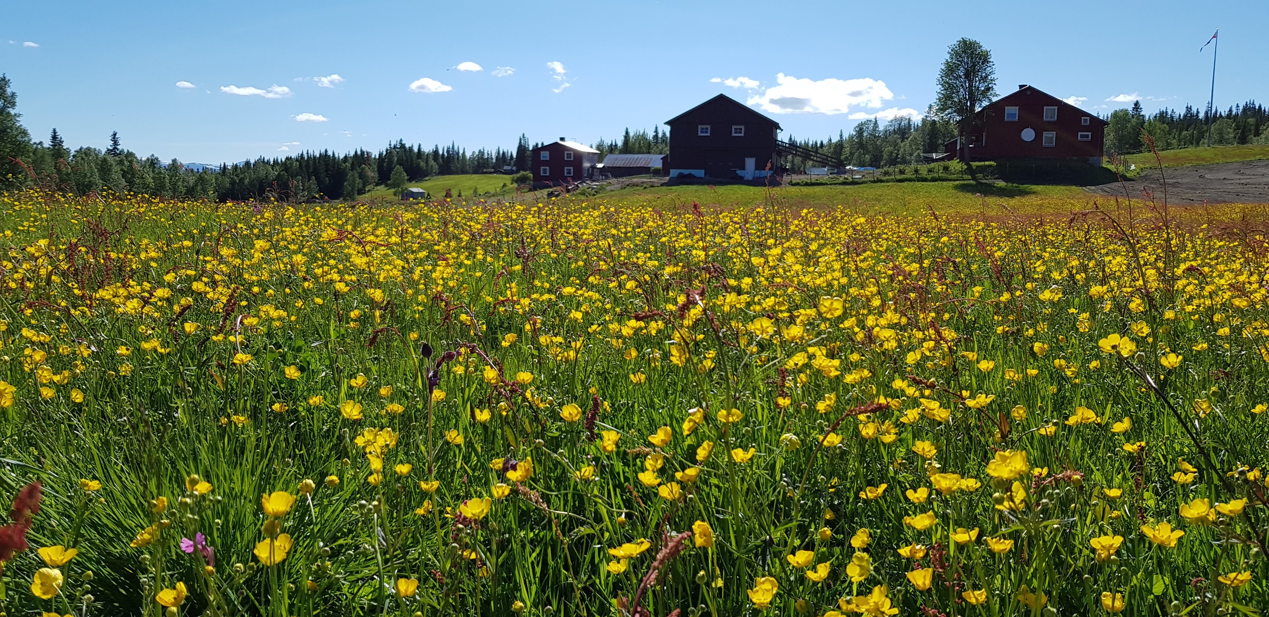 Gjefsjøen Fjellgård ved Gjevsjøen i Snåsa kommune. Foto: Lars Bugge Aarset